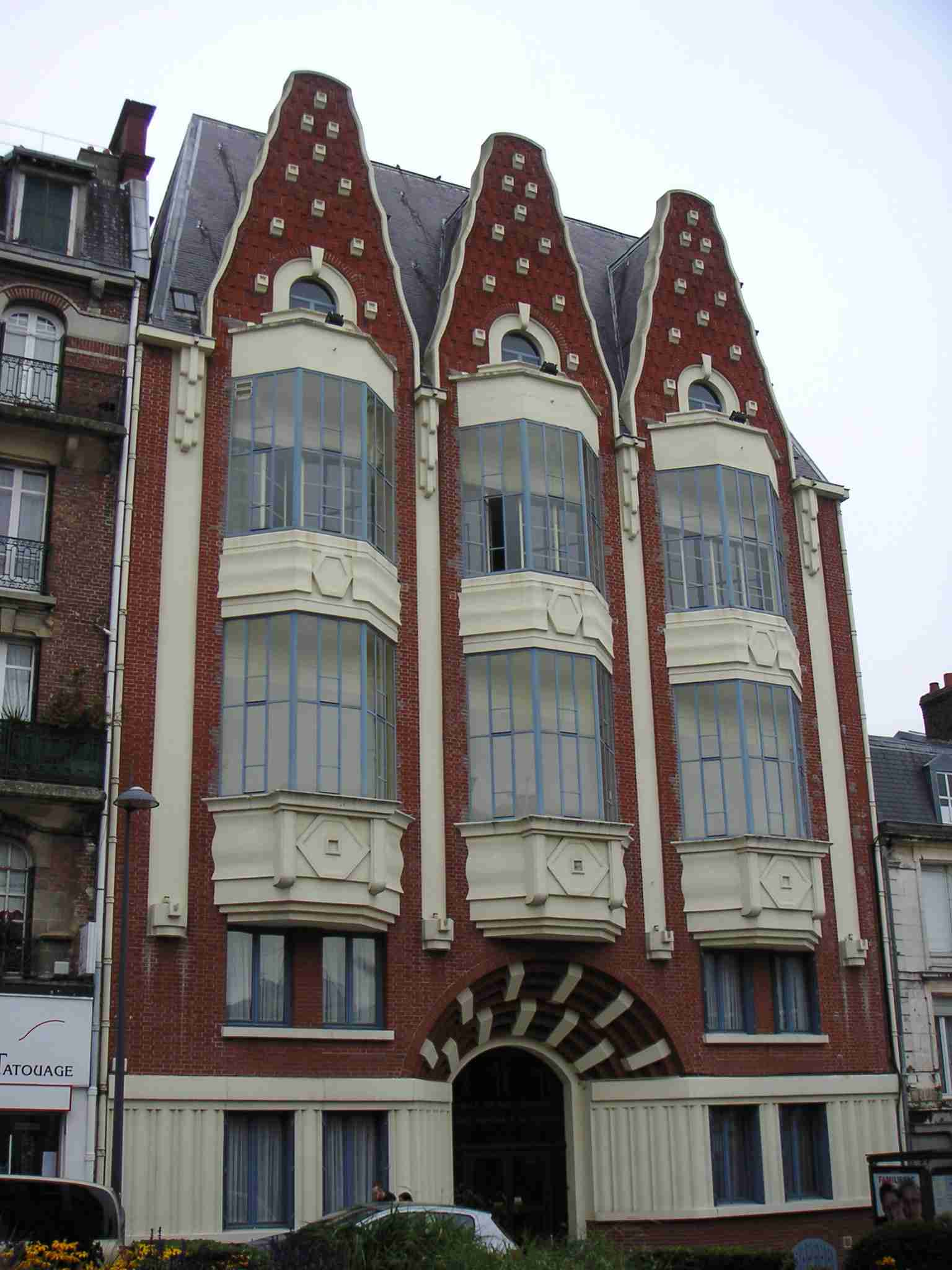 Photo des oriels de l'école de musique de Sain-Quentin (France)